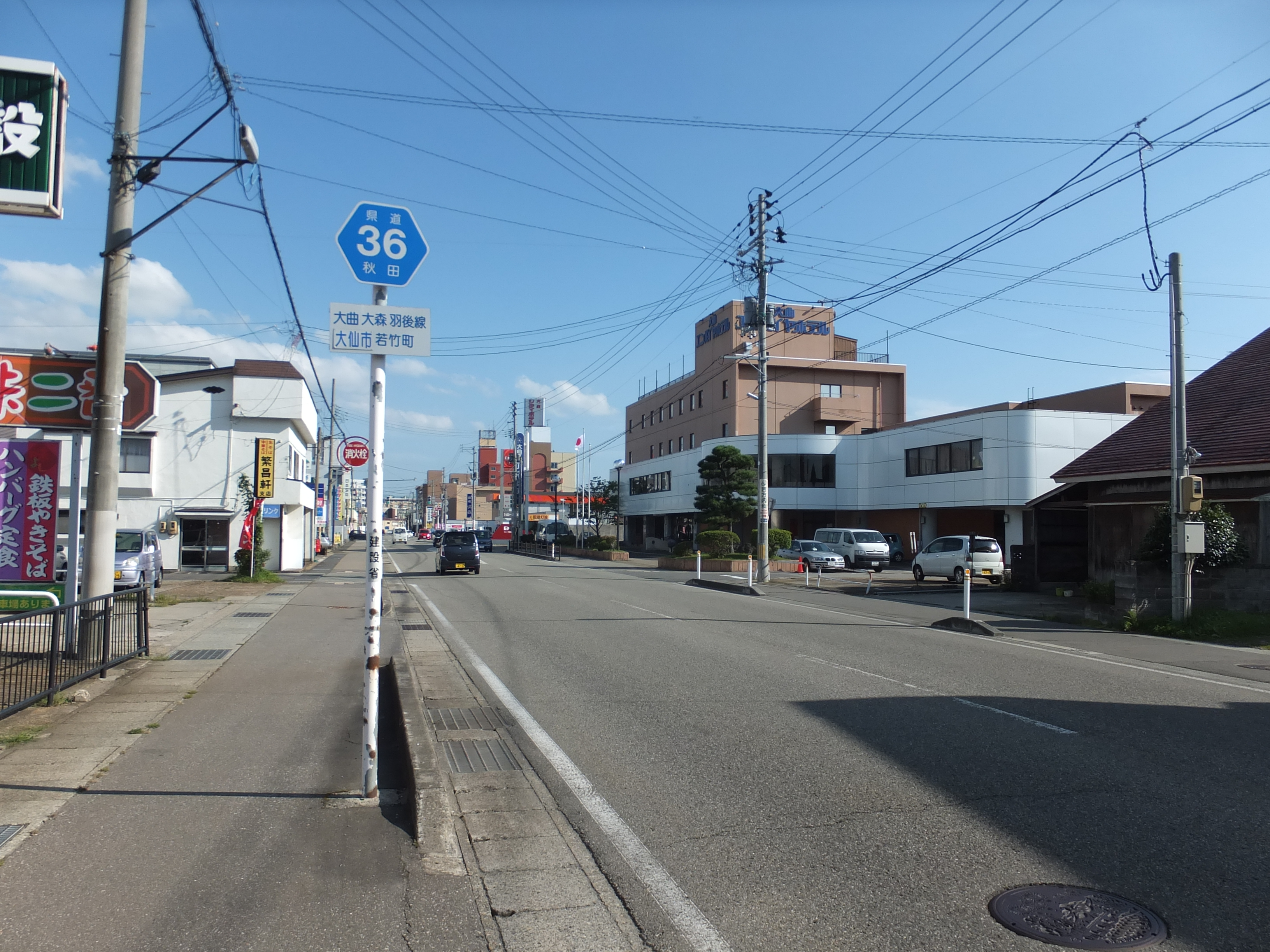 秋田県道36号大曲大森羽後線若竹町付近にて